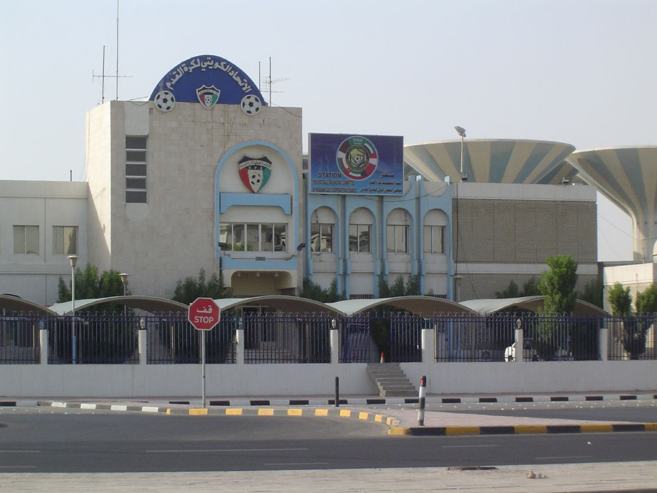 in Al-Audailliya, Kuwait